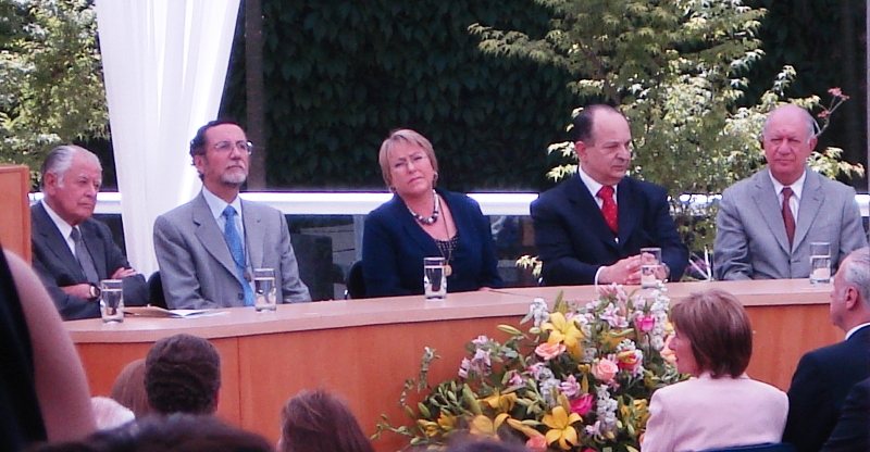 Inauguración del "Edificio Los Presidentes" de la Facultad de Derecho de la Universidad de Chile el 5 de noviembre de 2007. De izquierda a derecha: Patricio Aylwin, Víctor Pérez, Michelle Bachelet, Roberto Nahúm y Ricardo Lagos.